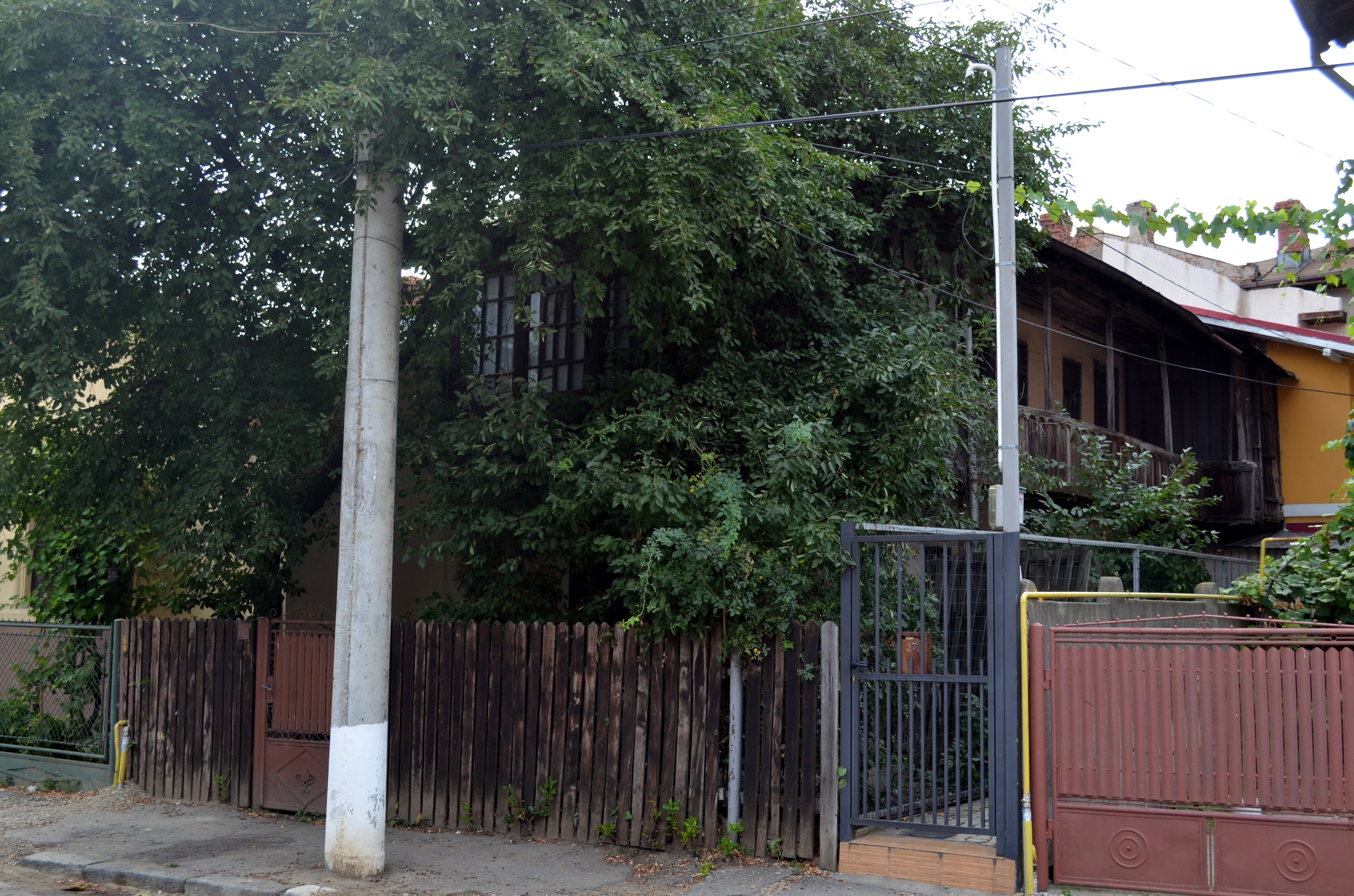 Casa Gheorghe și Margareta Teodorescu, Str. Decebal nr. 25, Ploiești